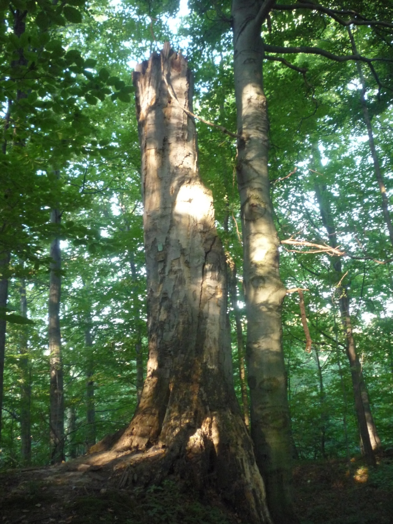 Pomnikowy buk - (martwe drzewo) w Niwnicach